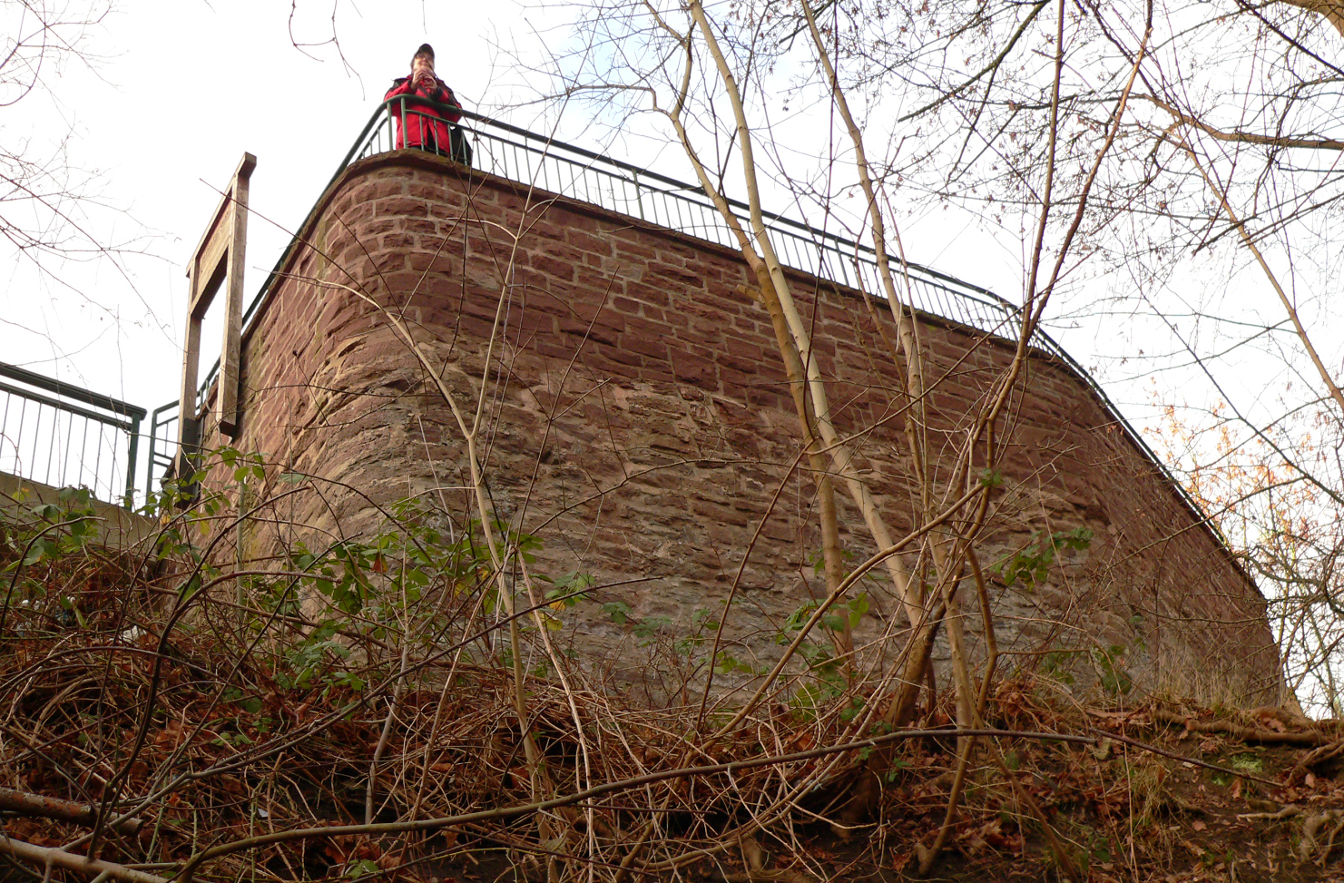 Befestigungsanlagen auf dem Klüt, Baurest von Fort Luise oberhalb der Weser an der B 1/B 83